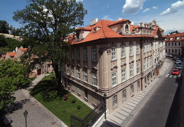 Kolovratský palác, Archív Kanceláře Senátu